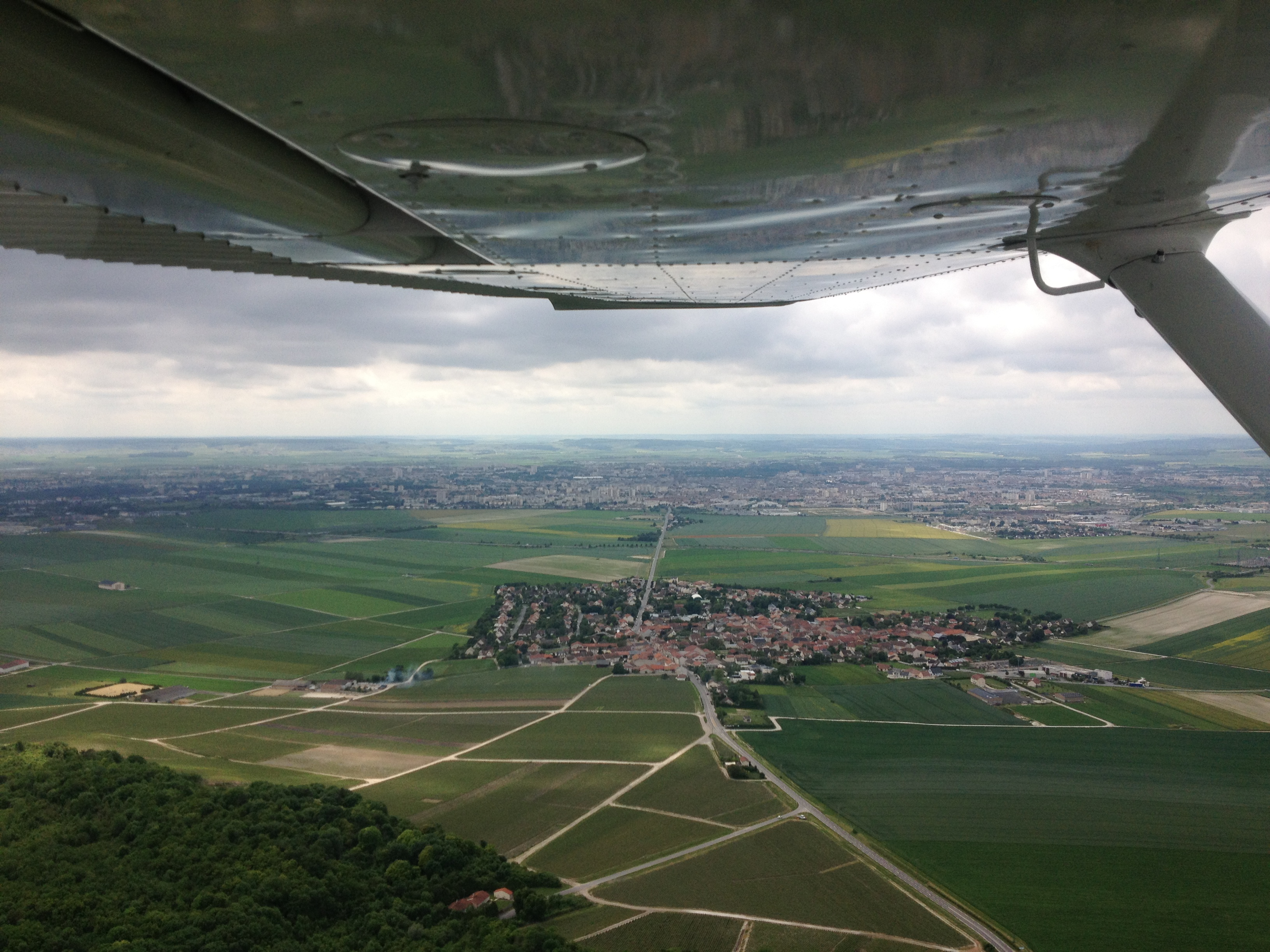 Cernay vu du ciel. Au loin, Reims.